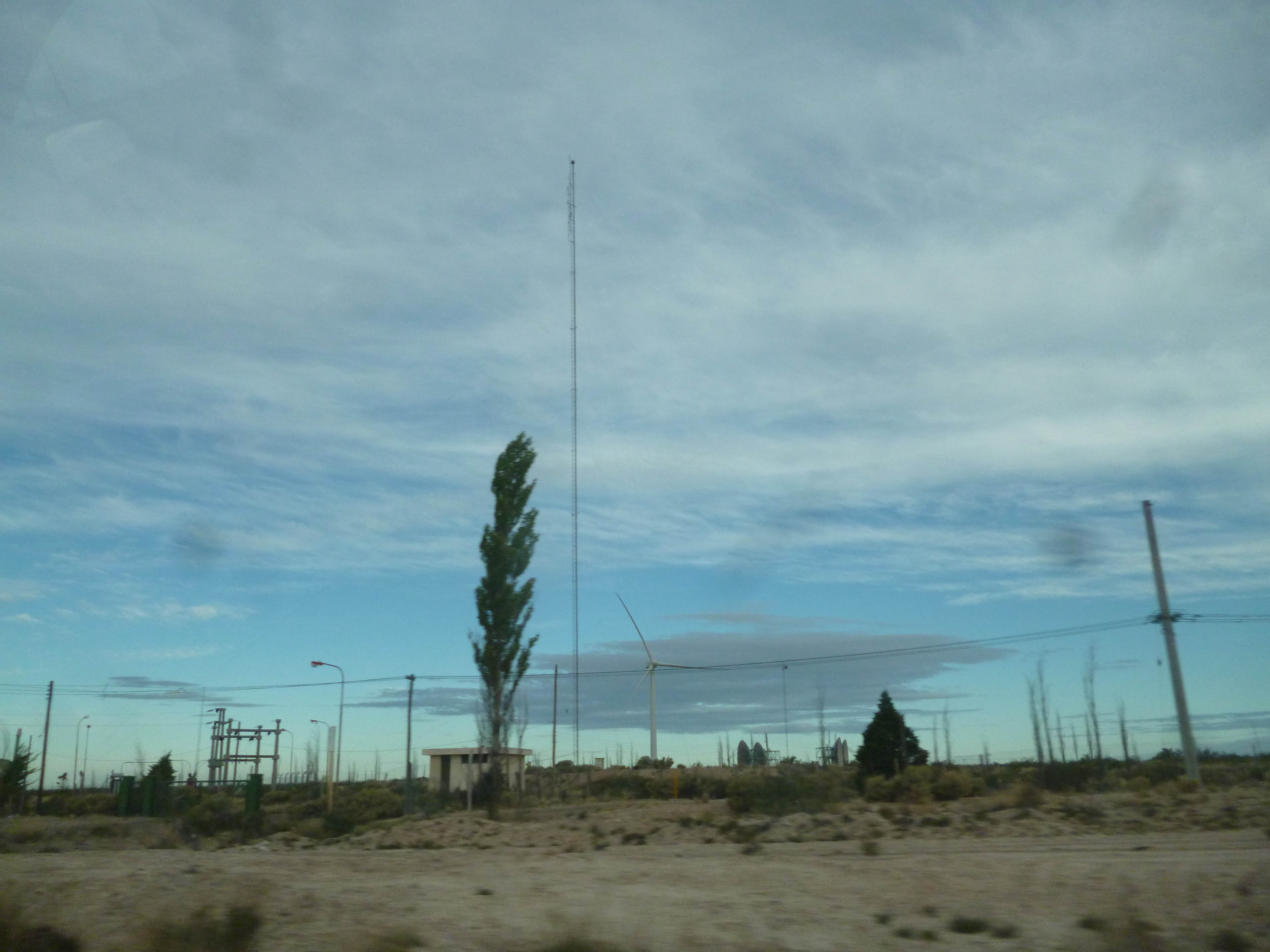 Parque eólico Loma Blanca, Trelew, Chubut, Argentina